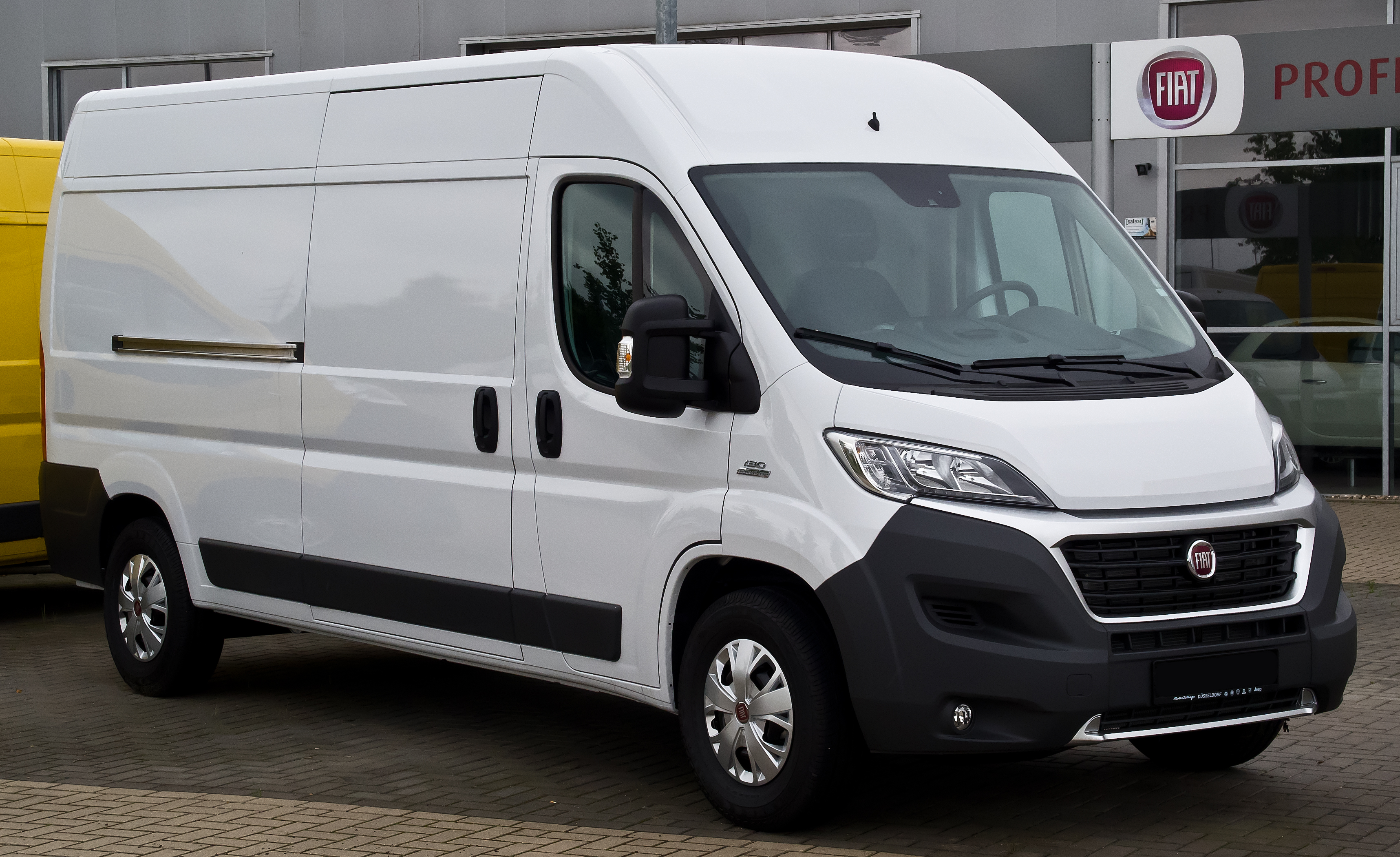 Fiat Ducato Kastenwagen 130 Multijet (III, Facelift)